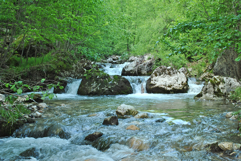 Скрапеж у Таору